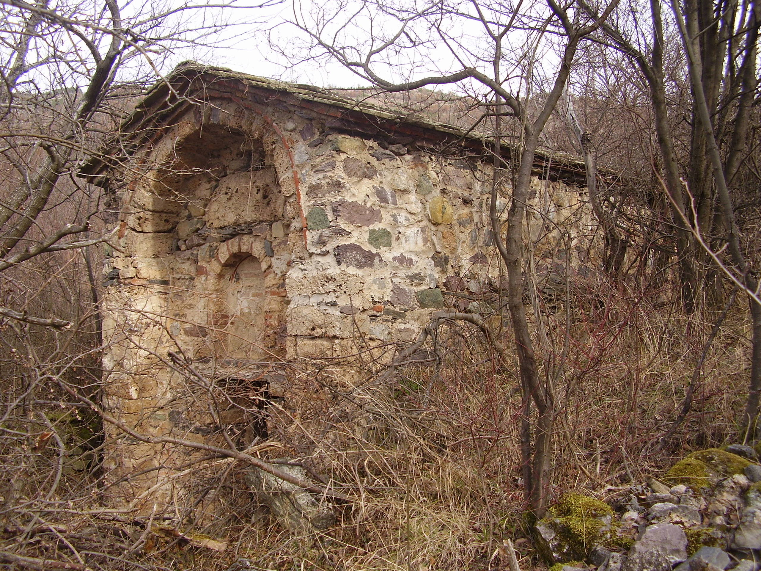 Средновековната църква "Свети Никола" - с.Вуково, община Бобошево